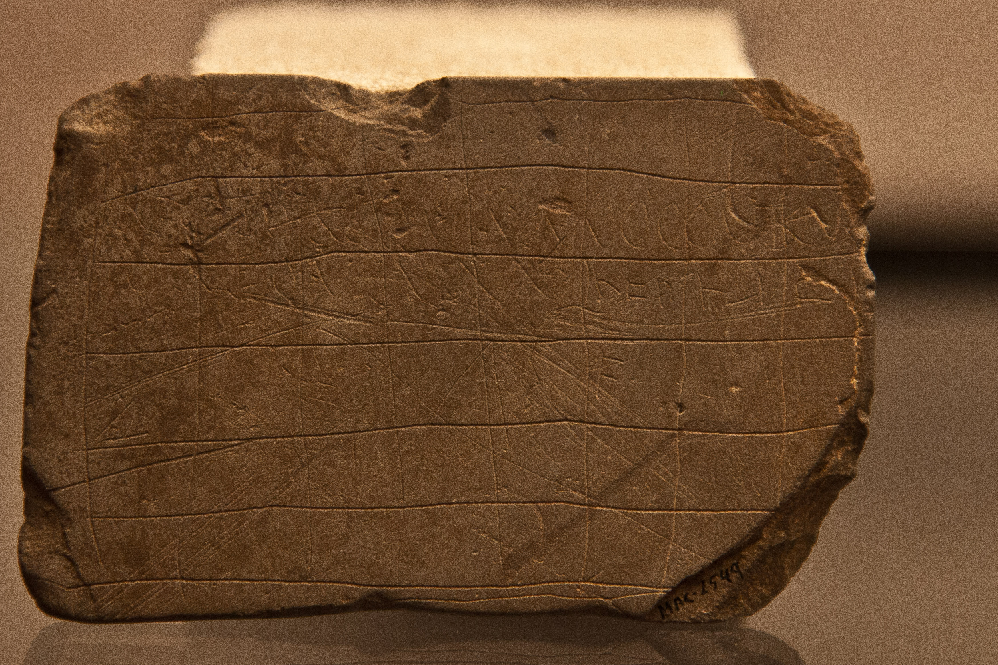 Villa romana de Noville, concello de Mugardos (A Coruña) s. IV-V d.C.